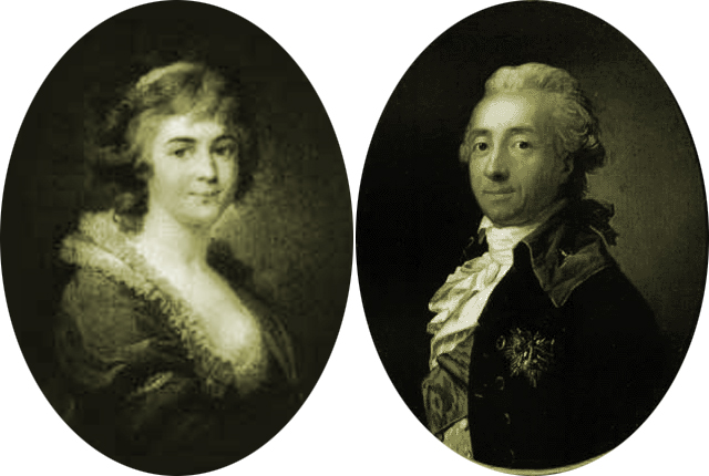 Радзивиллы